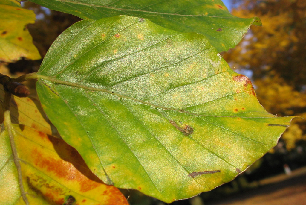 Blatt einer Buche